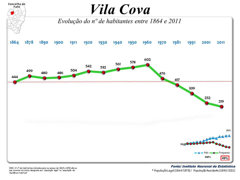 Censos 1864/2011